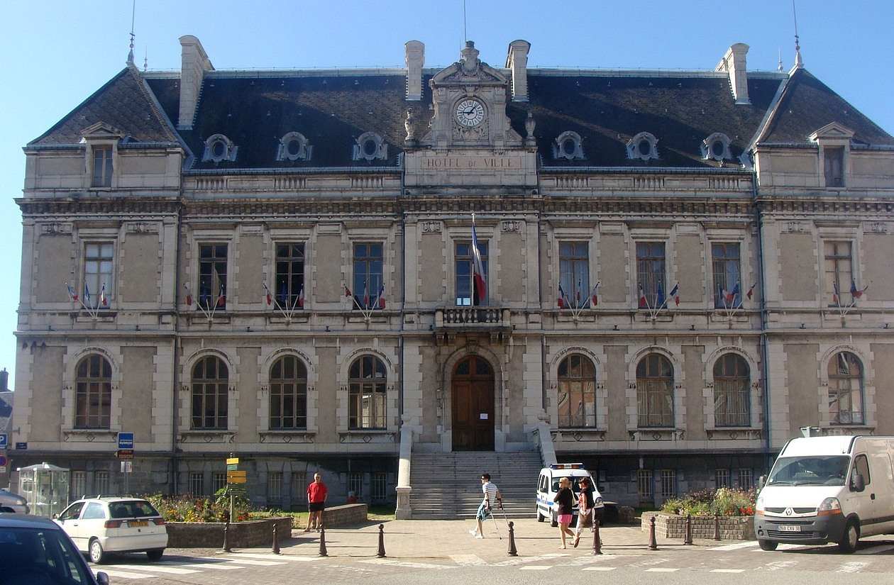 La mairie de la Mure (Isère).